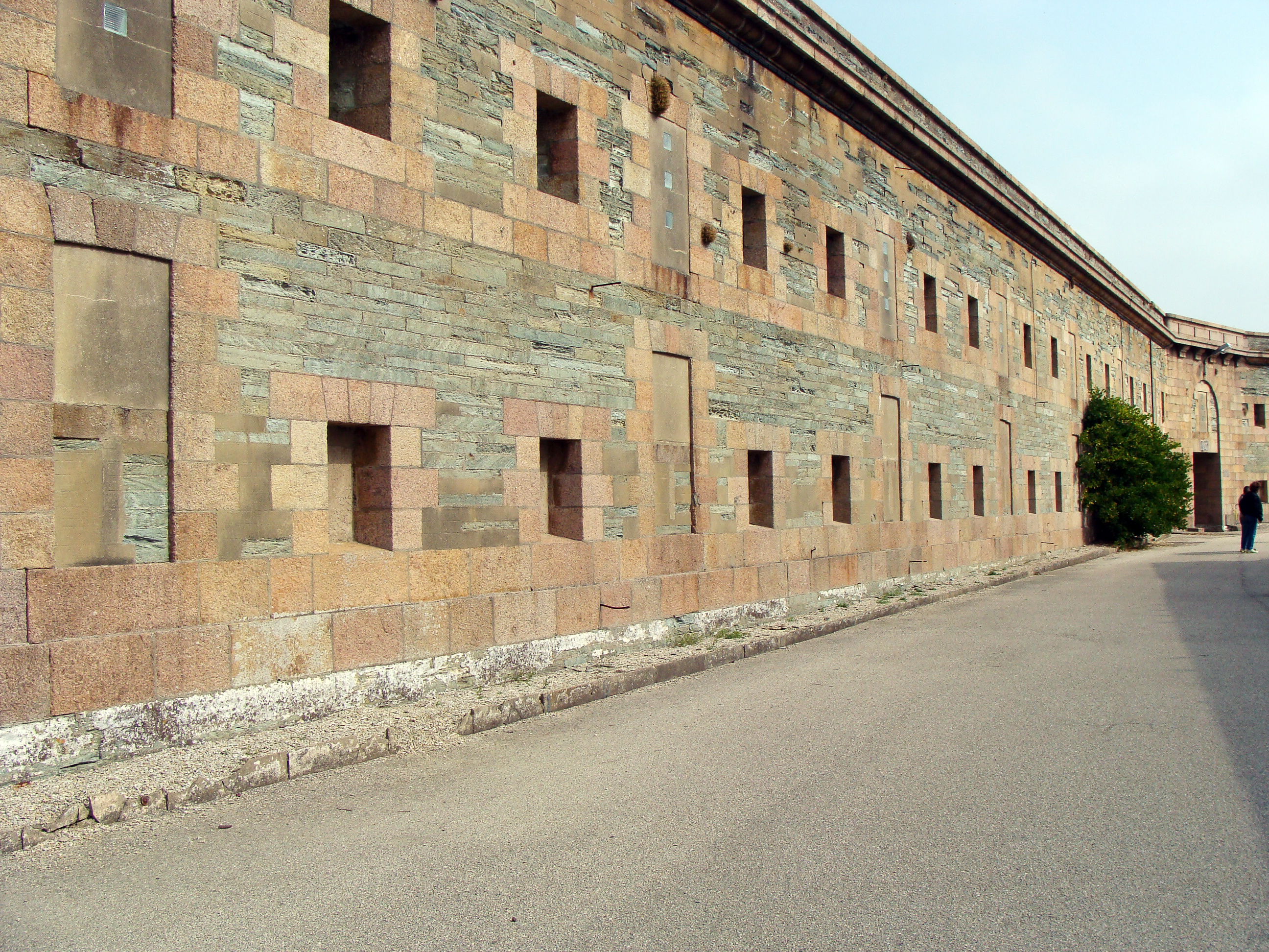 Entrée du Fort de Querqueville